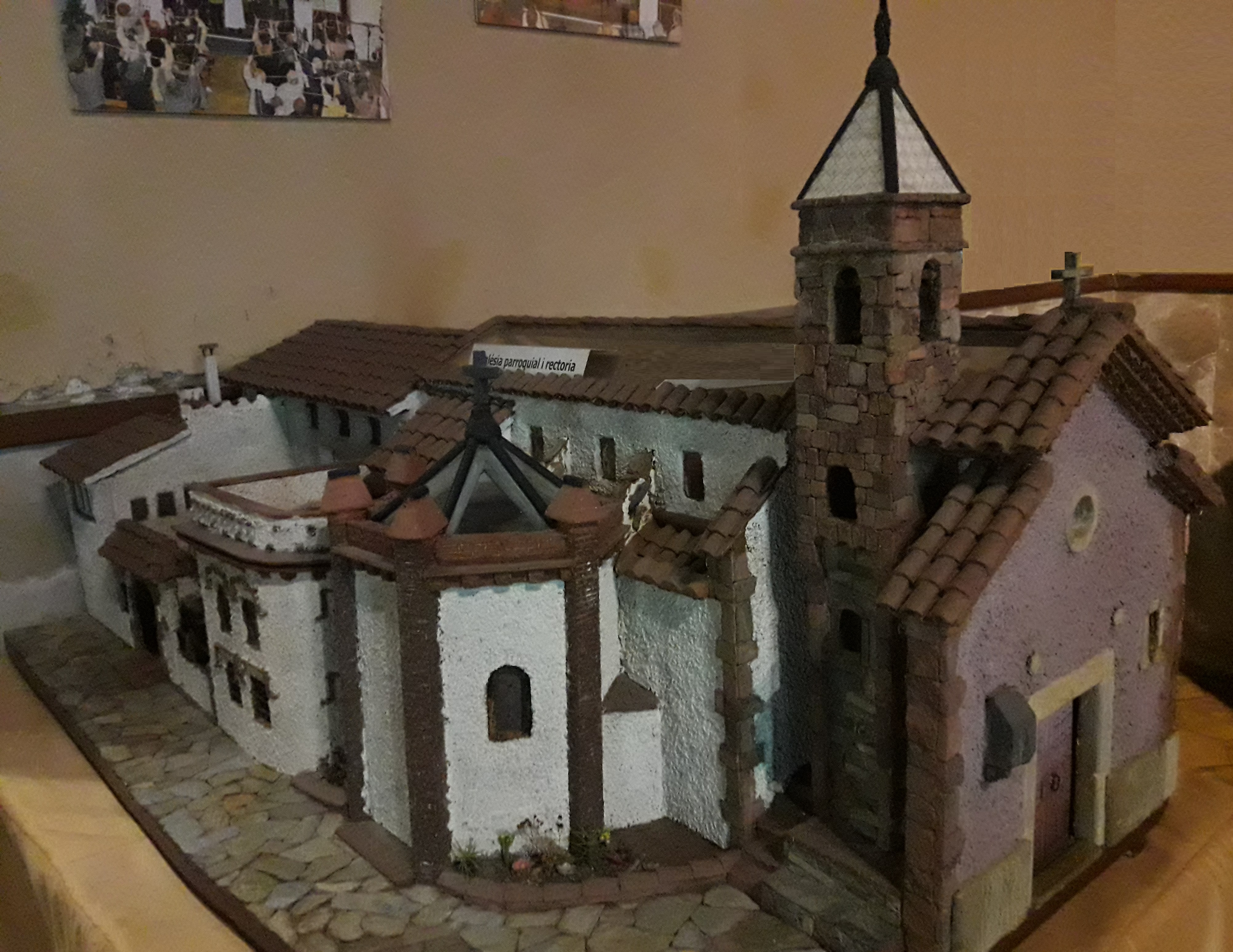 Maqueta de l'Església Parroquial de Sant Climent